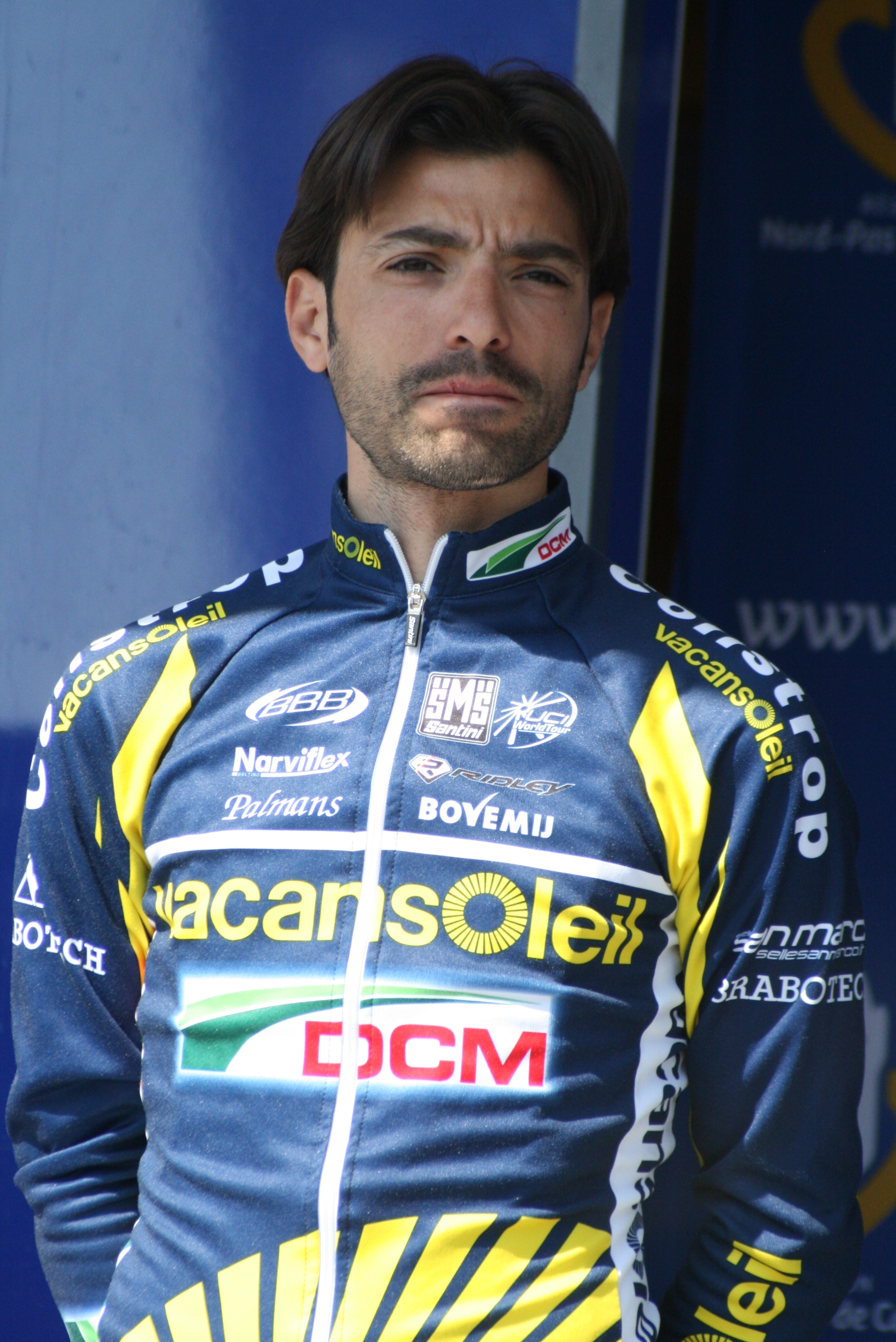 Présentation des coureurs au départ de la première étape Santo Anza